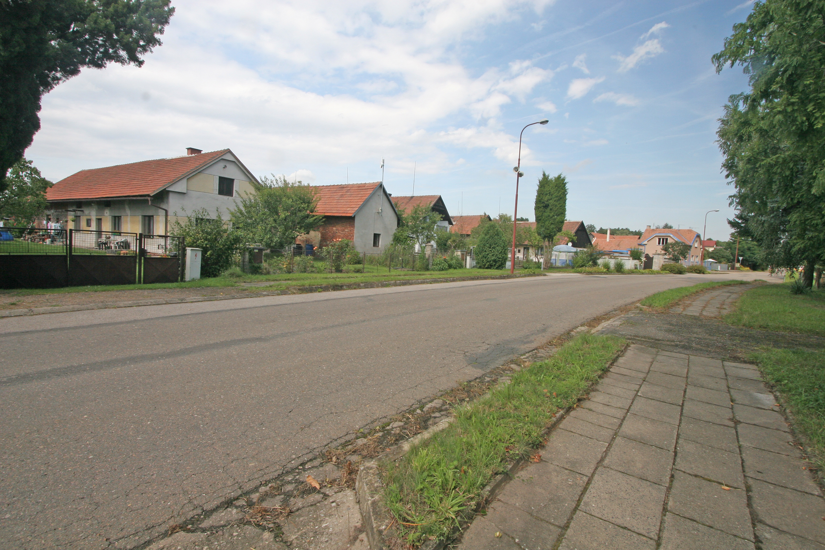 Komárov čp. 5